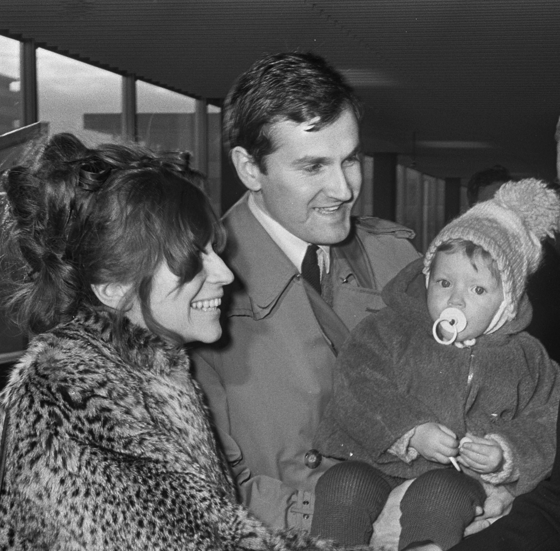 Aankomst Zweedse voetballer Inge Danielsen op Schiphol (voor Ajax)